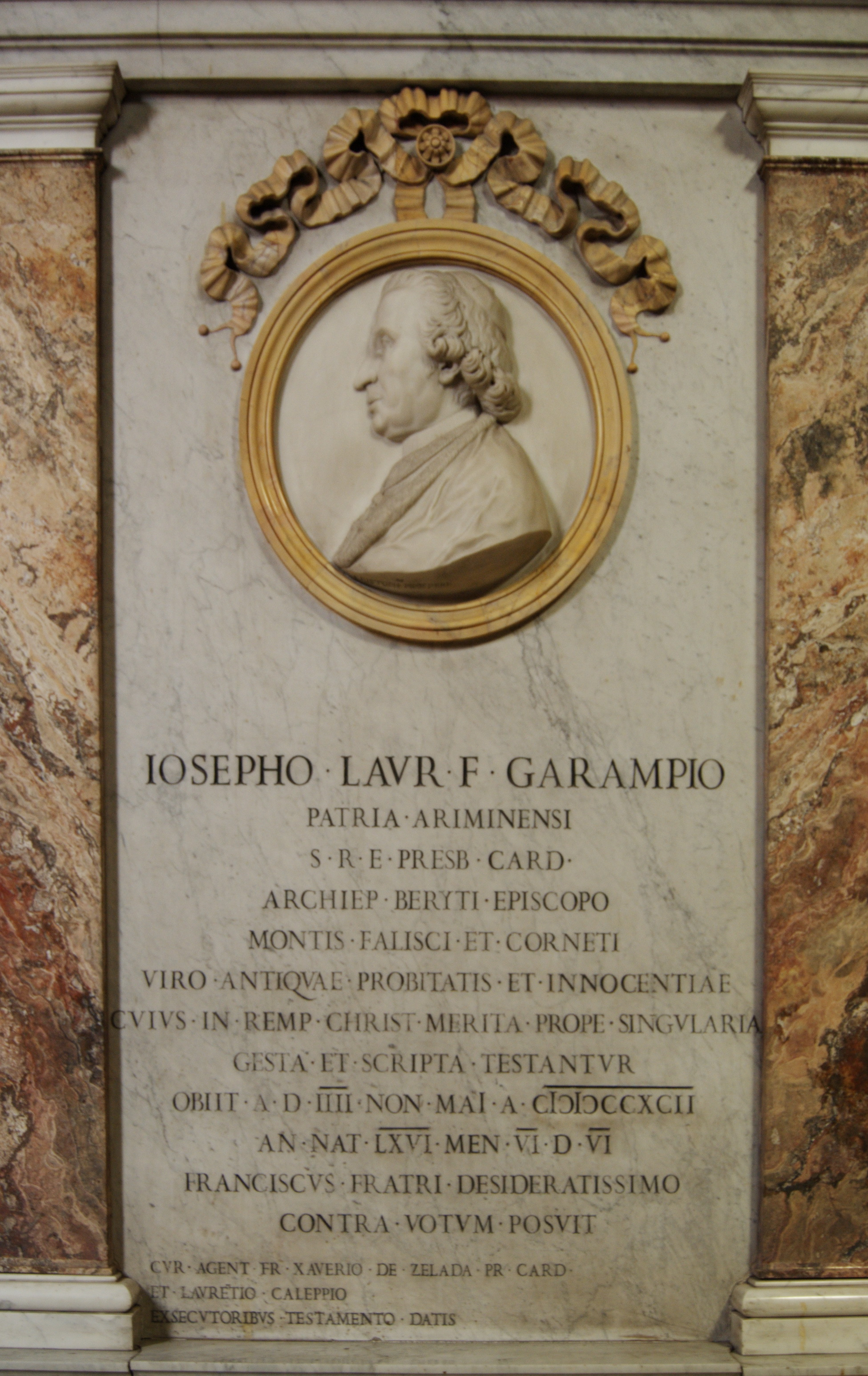 Tomba del cardinale Giuseppe Garampi all'interno della chiesa dei Santi Giovanni e Paolo a Roma